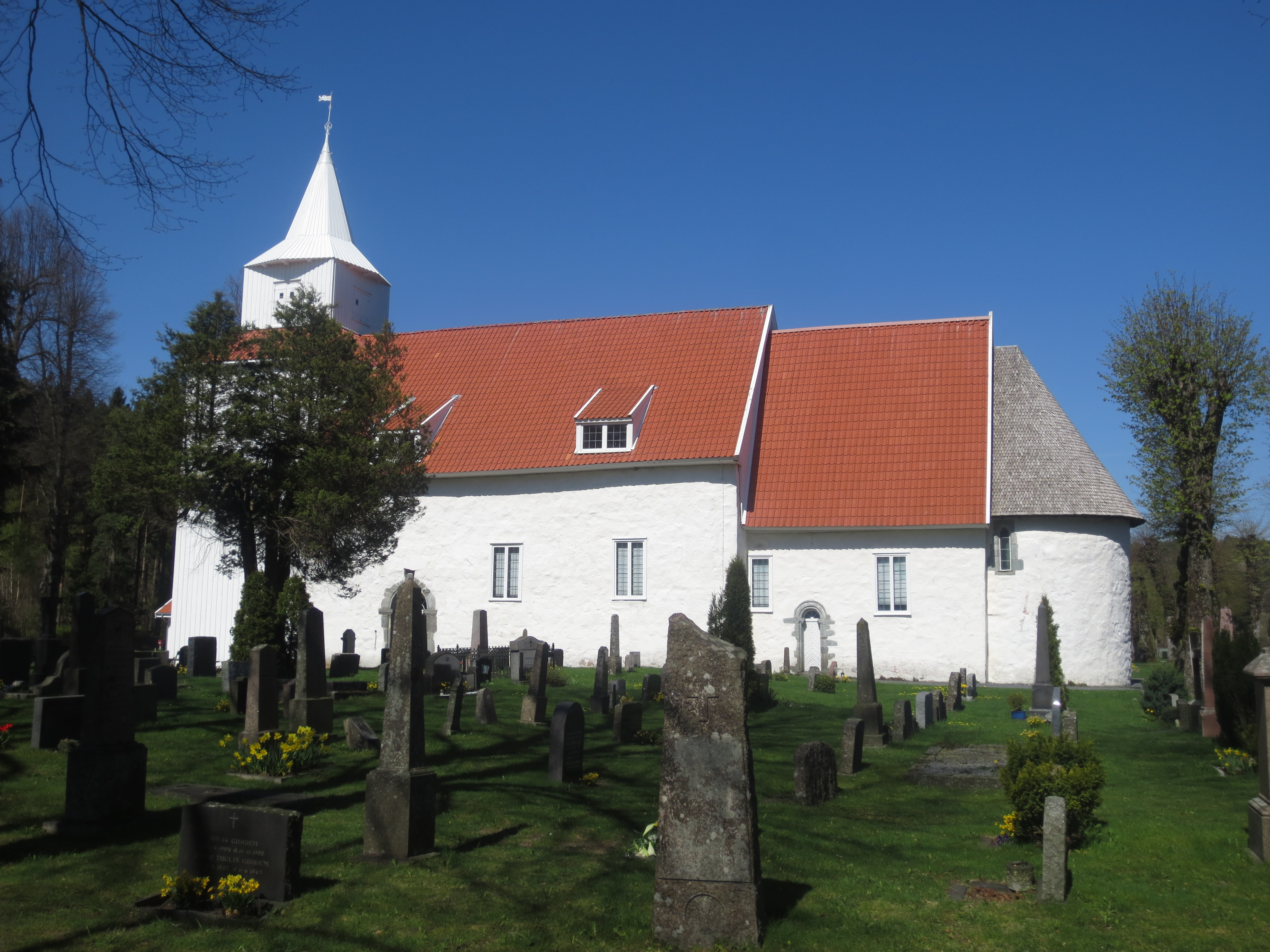 Middelalderkirken i Fjære, Grimstad (Aust-Agder). Kirken er kjent fra diktet om Terje Vigen, og er et viktig middelalderbygg på Sørlandet.